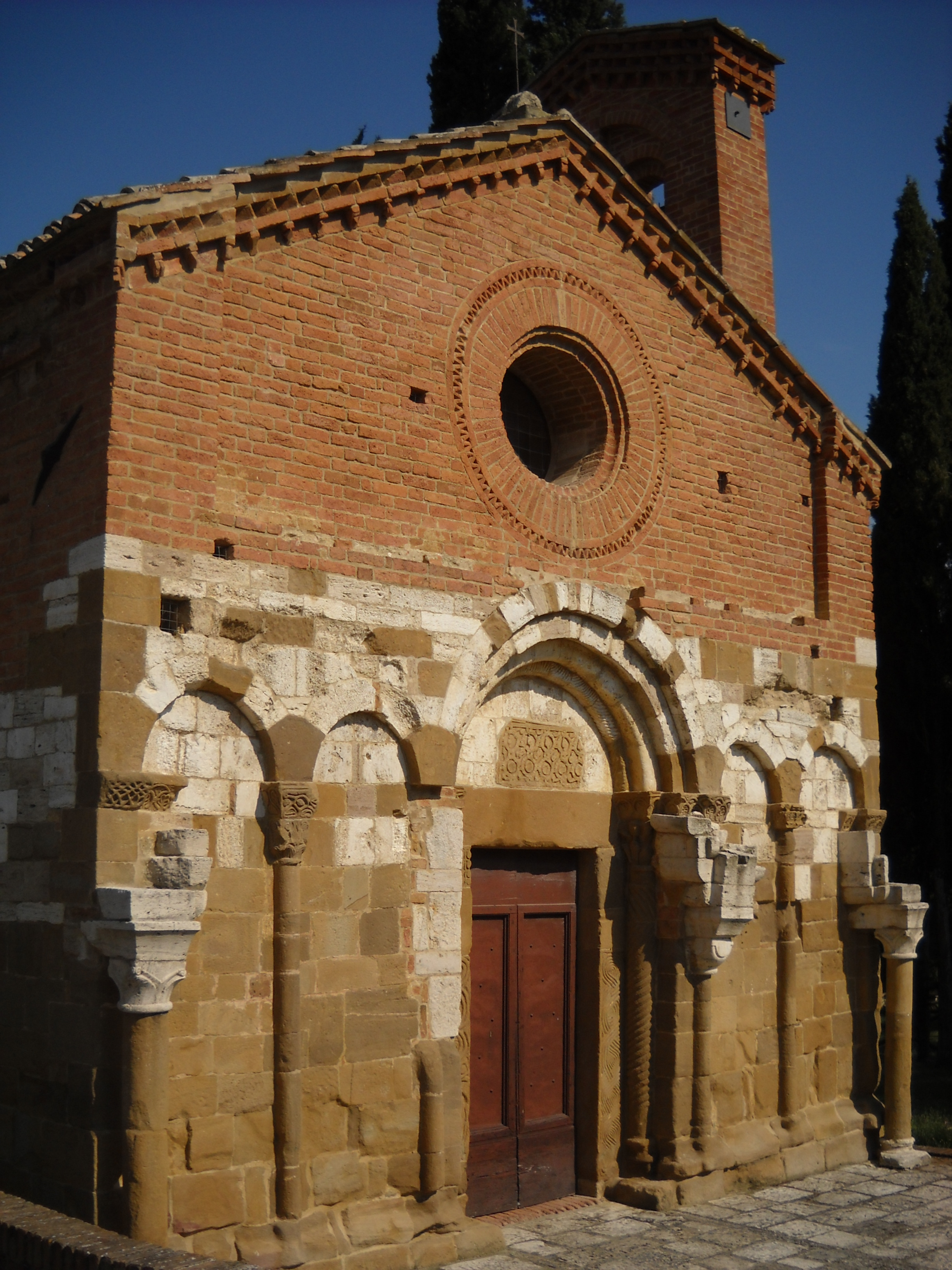 La facciata a capanna della chiesa di San Pietro in Villore a San Giovanni d'Asso, in provincia di Siena.